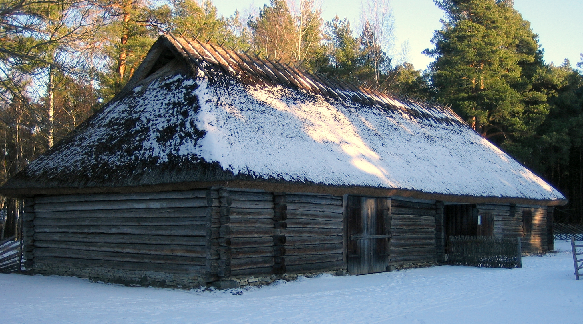 Rehielamu Vabaõhumuuseumis. Pärineb Köstriaseme talust, Hageri kihelkonnast Harjumaalt. Ehitatud ca. 1890. Vabaõhumuuseumis alates 1959.